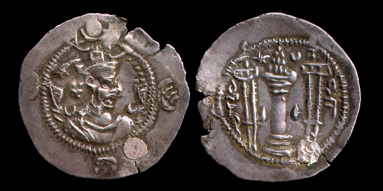 Moneda de Kavad I del Imperio Sasánida cuyo reinado duró del 488 al 531.